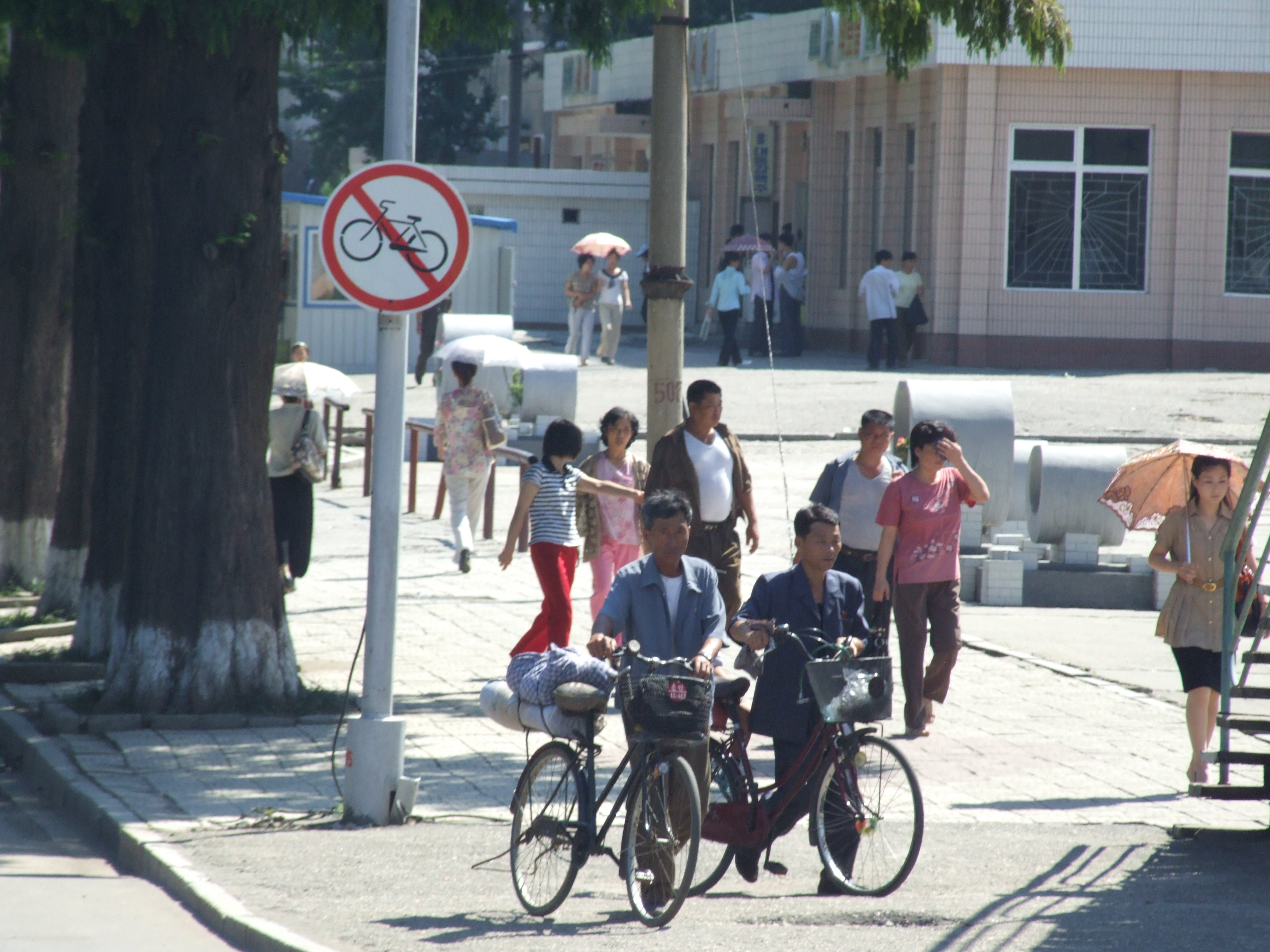 Radfahrer bei Pjöngjang